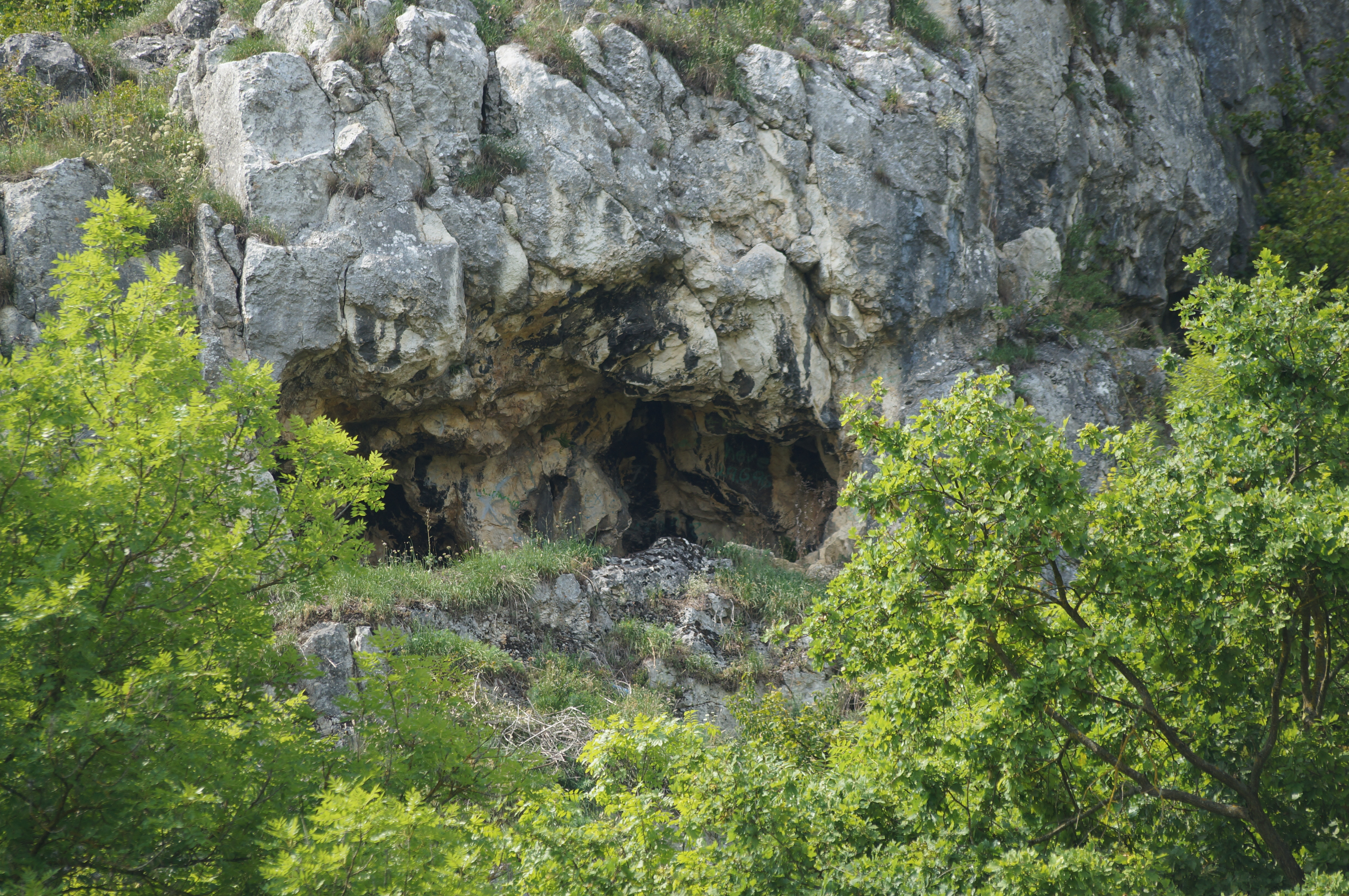 Zweigeteilte Halbhöhle am Keilberg oberhalb von Schwabelweis, Geotop-Nr.: 362H001, Großer Höhlenfelsen (G 6)